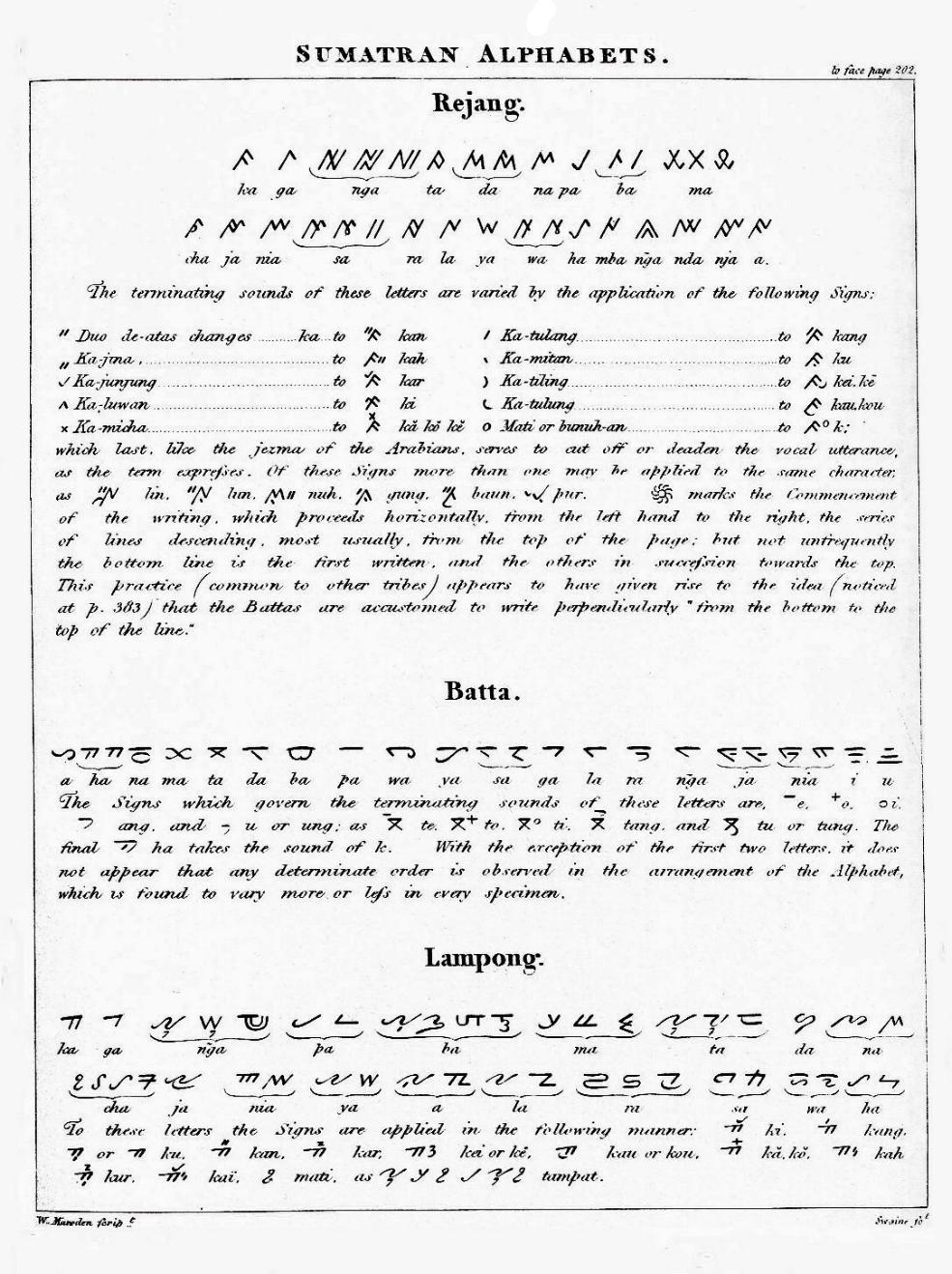 William Marsden: The History of Sumatra. Sumatran Alphabets